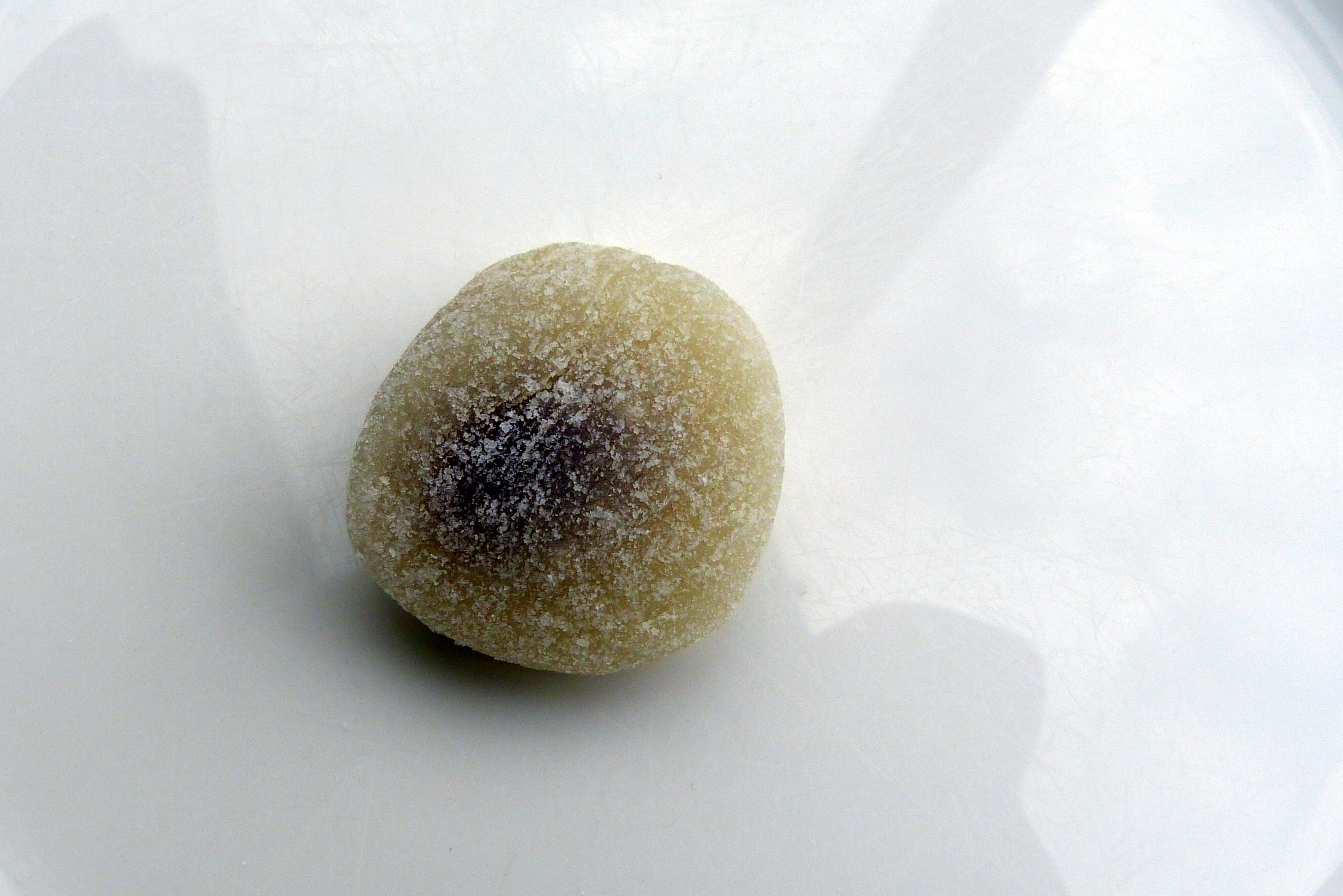 Aiwowo, Klebreisbällchen mit Füllung, industriell gefertigt